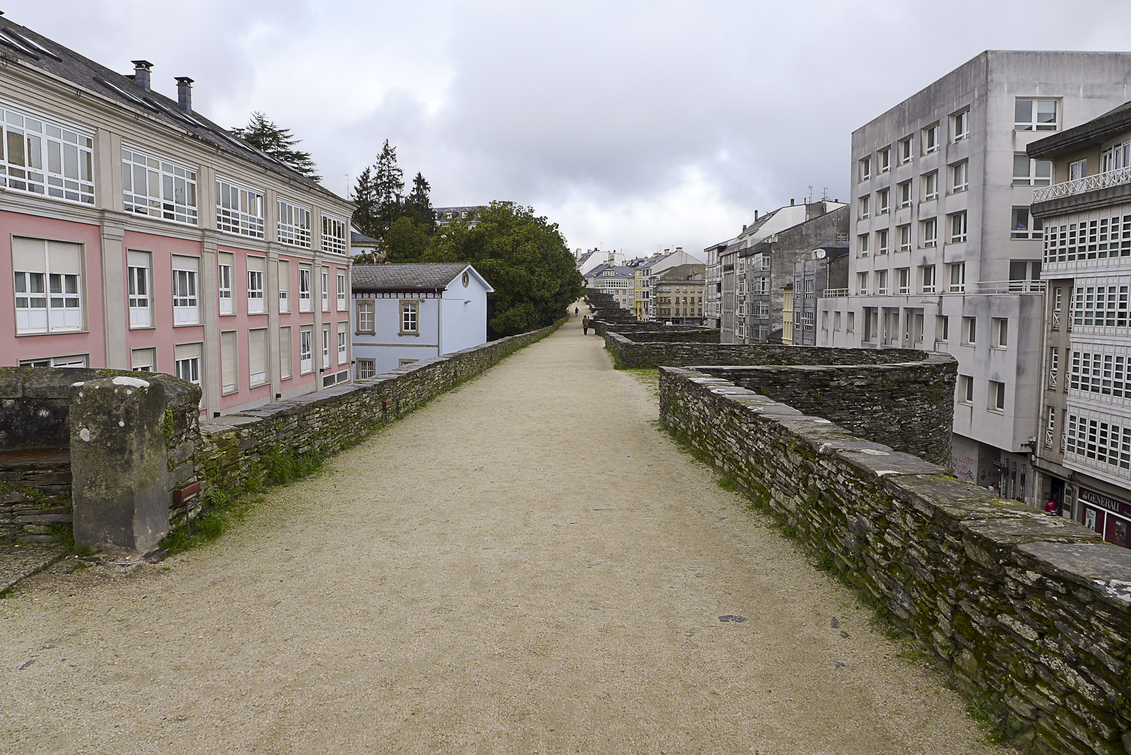 Spain-Lugo-P1160929